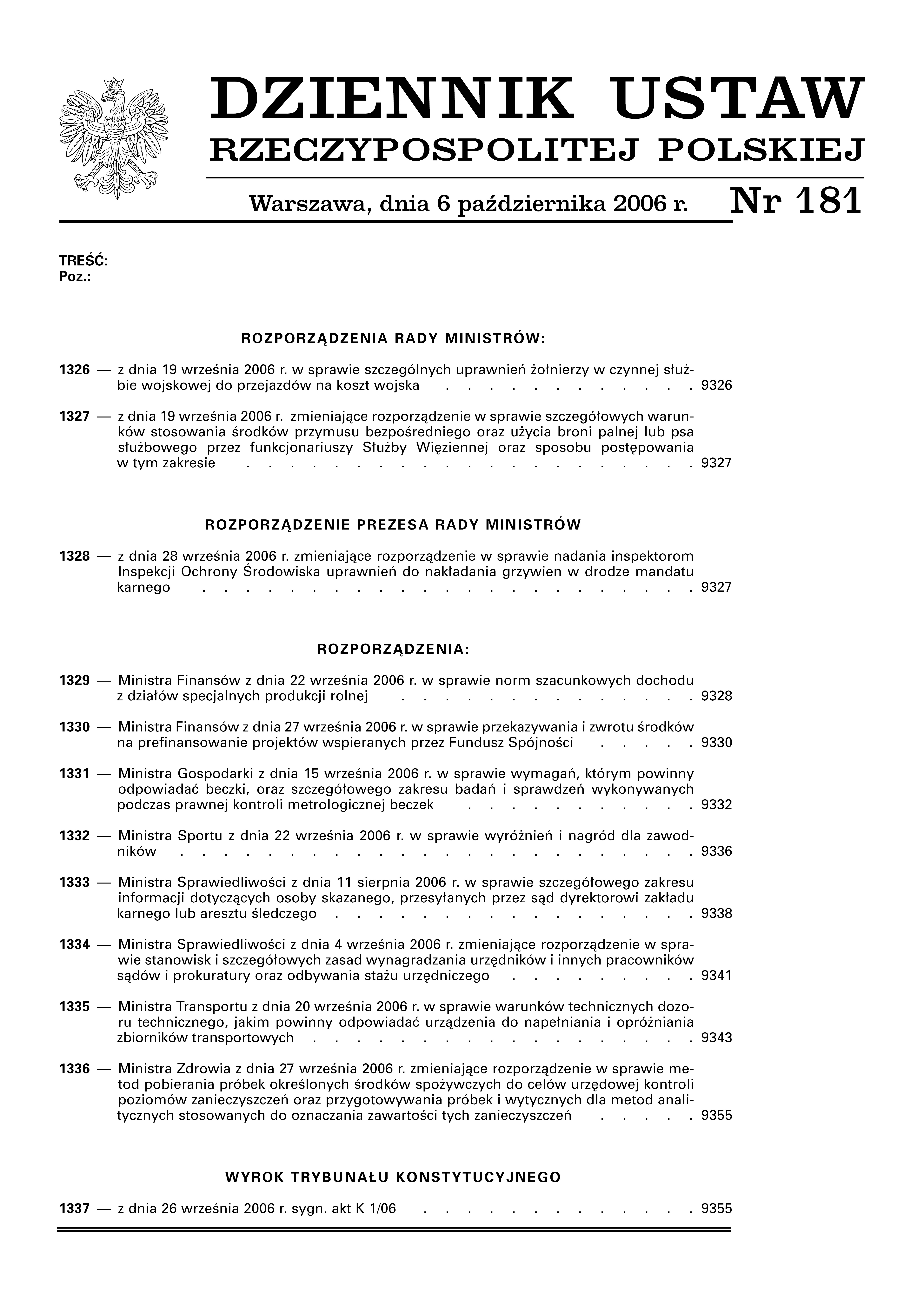 Pierwsza strona "Dziennika Ustaw" nr 181 z 2006